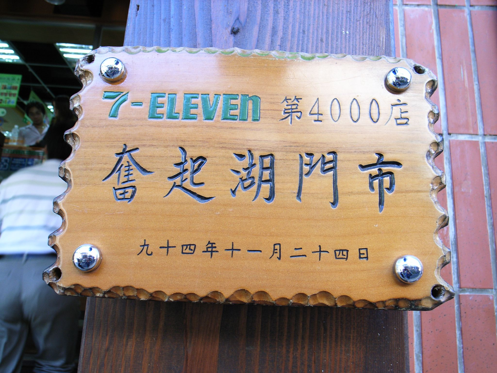 中文（台灣）: 奮起湖大飯店外牆，統一超商奮起湖門市「7-Eleven第4000店」標示牌，2005年（中華民國94年）11月24日設立，2015年（中華民國104年）整修時拆除。